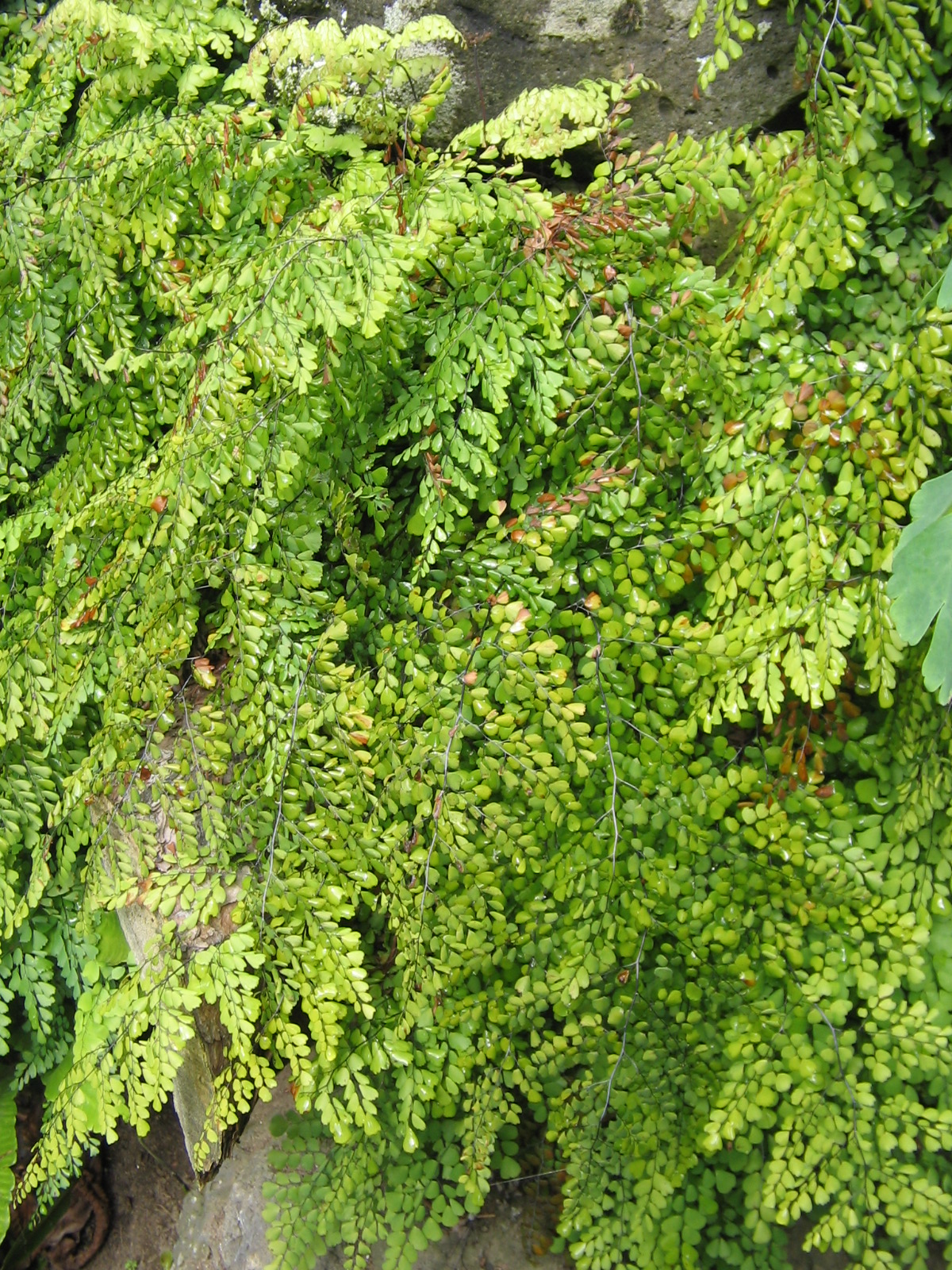 Adiantum venustum in Germany